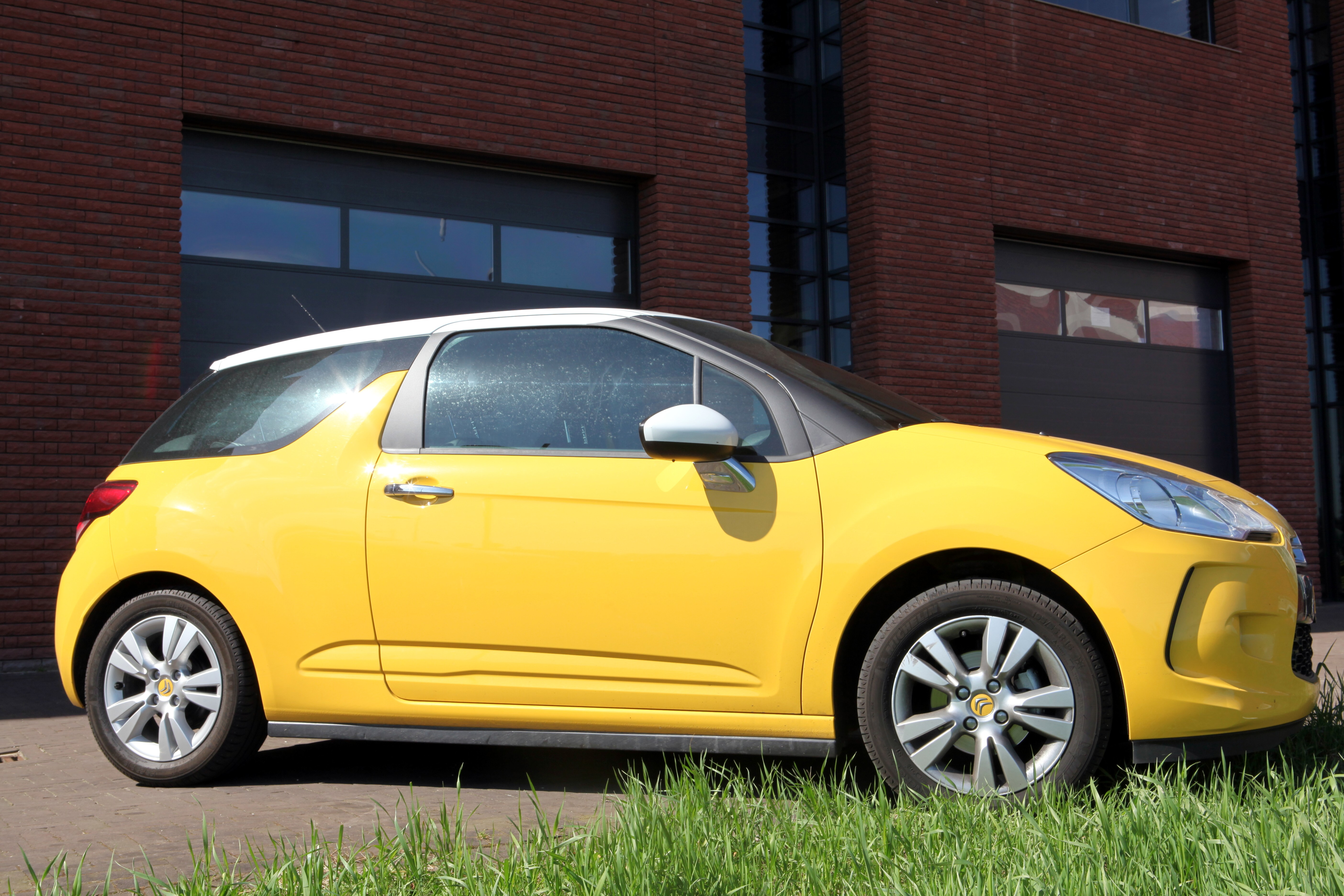 Citroen DS 3